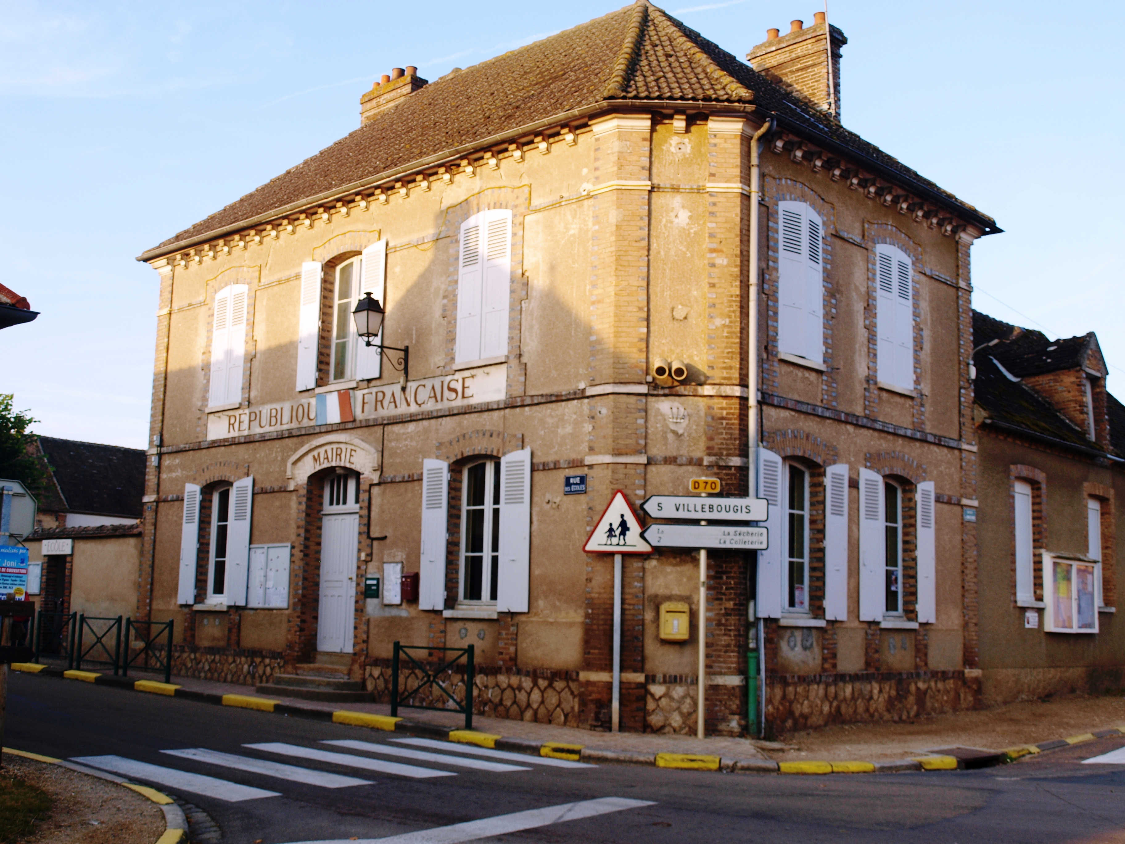 Saint-Sérotin (Yonne, France) ; la mairie.